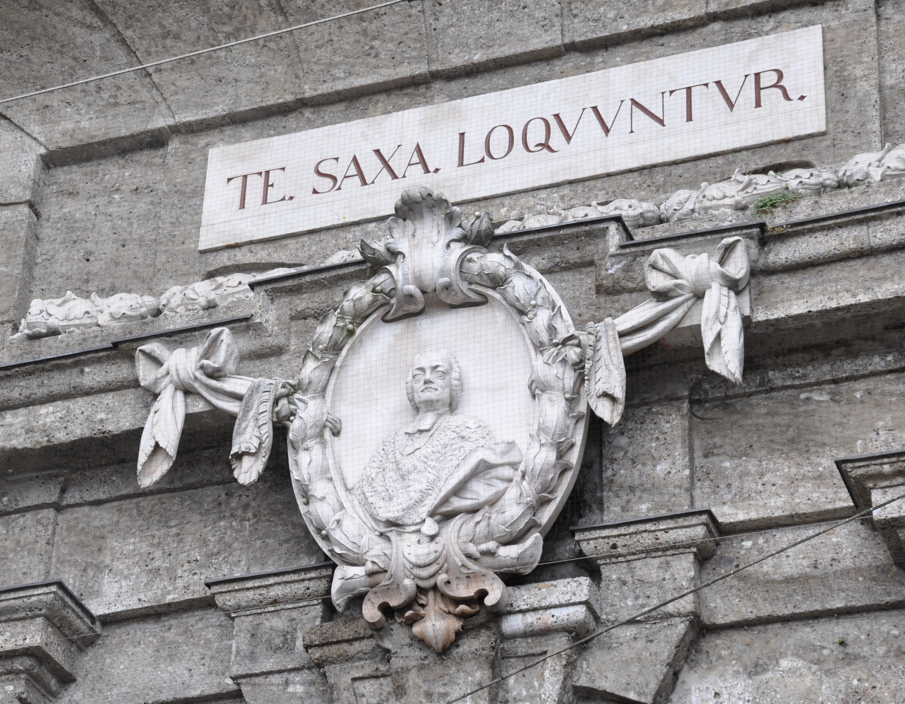 Salzburg, Sigmundstor (Neutor), Ostportal (Stadtseite), Detail